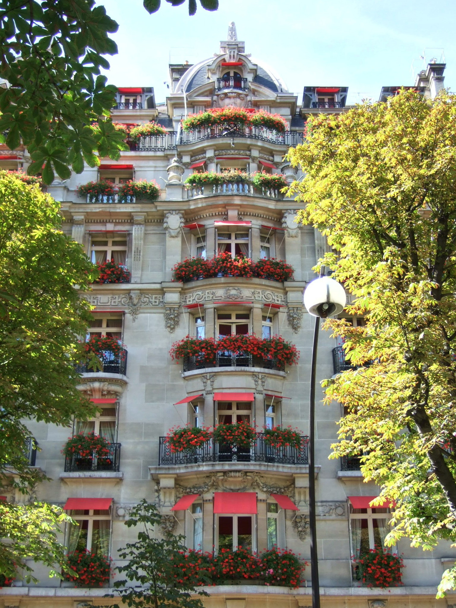 Plaza athénée, Paris VIII